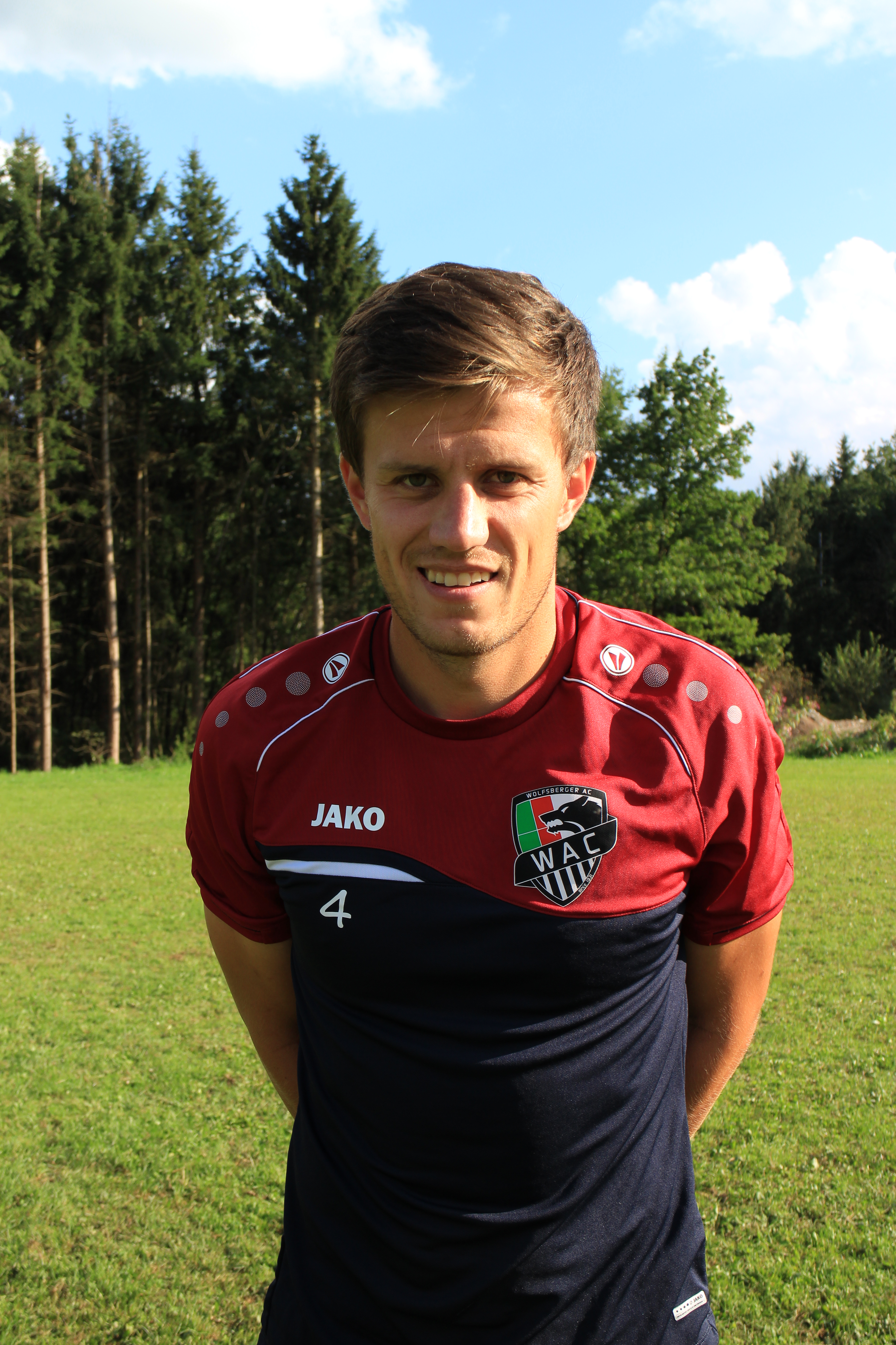 Manfred Gollner (WAC)